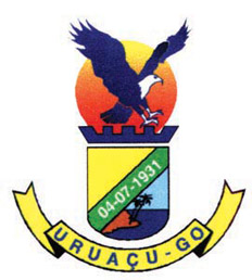 Brasão de Armas do município de Uruaçu, Goiás, Brasil.